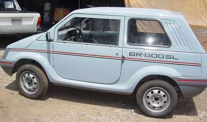 Automóvel marca Gurgel, modelo BR800, fabricado no Brasil